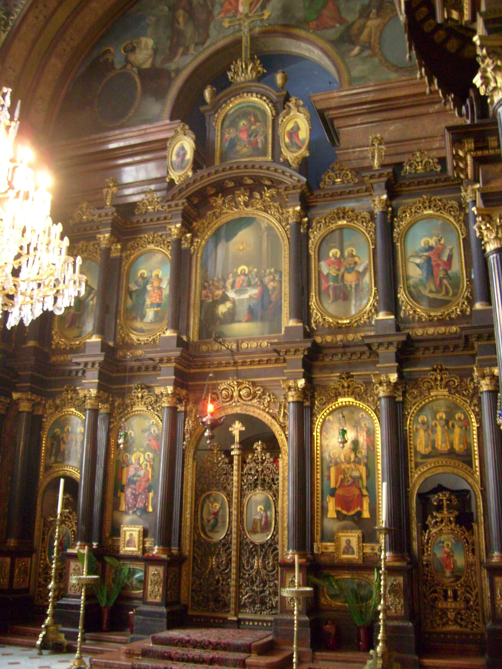 Ikonostasis der griechisch-orthodoxen Kirche zur Hl. Dreifaltigkeit, Wien.